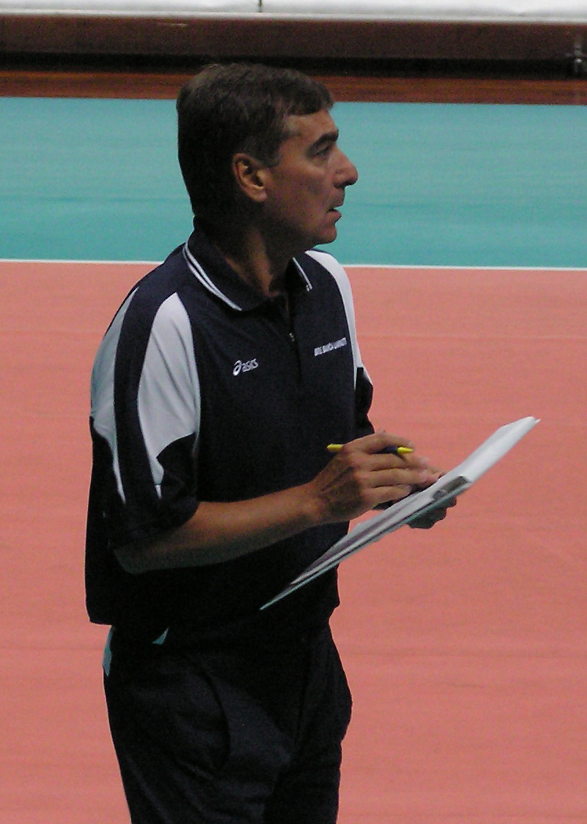 Silvano Prandi durante un allenamento estivo a Cuneo nel 2006